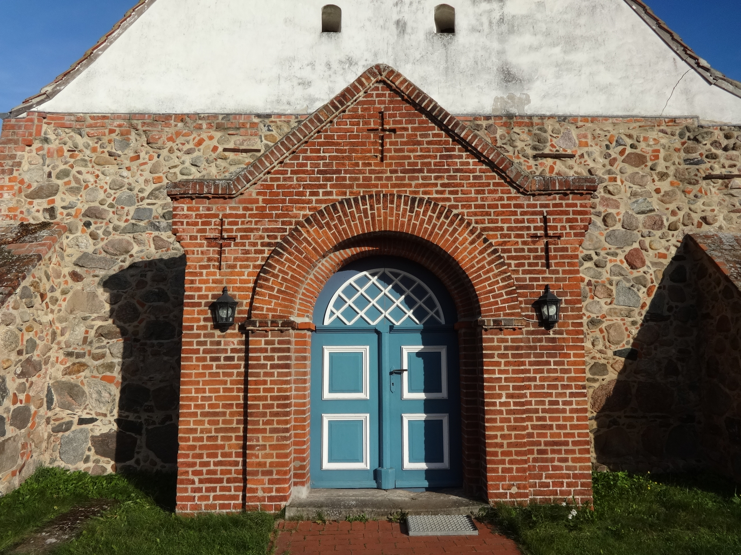 Das Bauwerk entstand in den Jahren 1184 bis 1194 als feudaler Profanbau mit einer Kapelle und wurde erst im 15. Jahrhundert zur Kirche gewidmet. Er ist aus Feldstein errichtet, während der Anbau sowie die Sakristei aus dem 19. Jahrhundert mit Mauerziegeln ausgeführt wurden, die sich deutlich von dem übrigen Baukörper absetzen. Der Fachwerkturm entstand um 1700. Im Innern befinden sich ein Altar aus dem Jahr 1648, eine Kanzel aus 1679 sowie ein Opferstock aus dem 16. Jahrhundert.